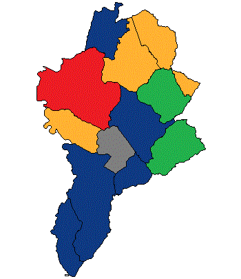 !Template:Llegenda}